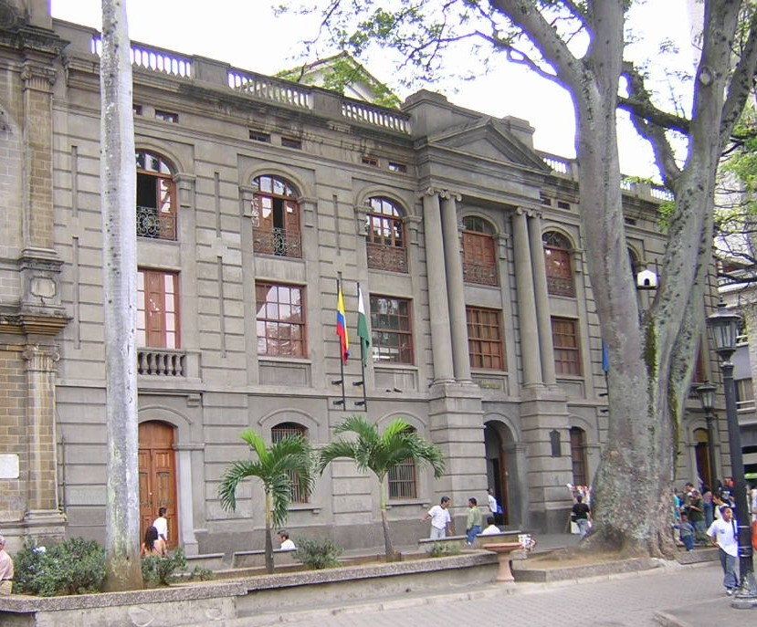 Claustro San Ignacio. Medellín, Colombia.